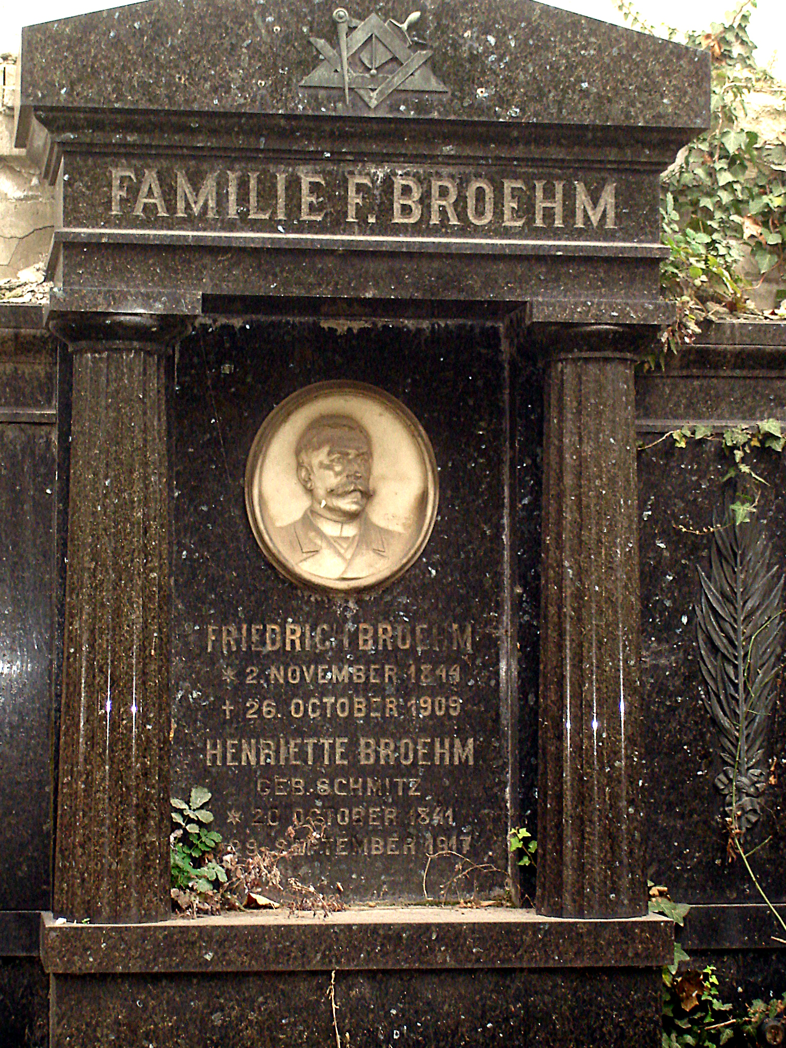 Monumentul funerar Fr. Broehm, Cimitirul Evanghelic Bucuresti